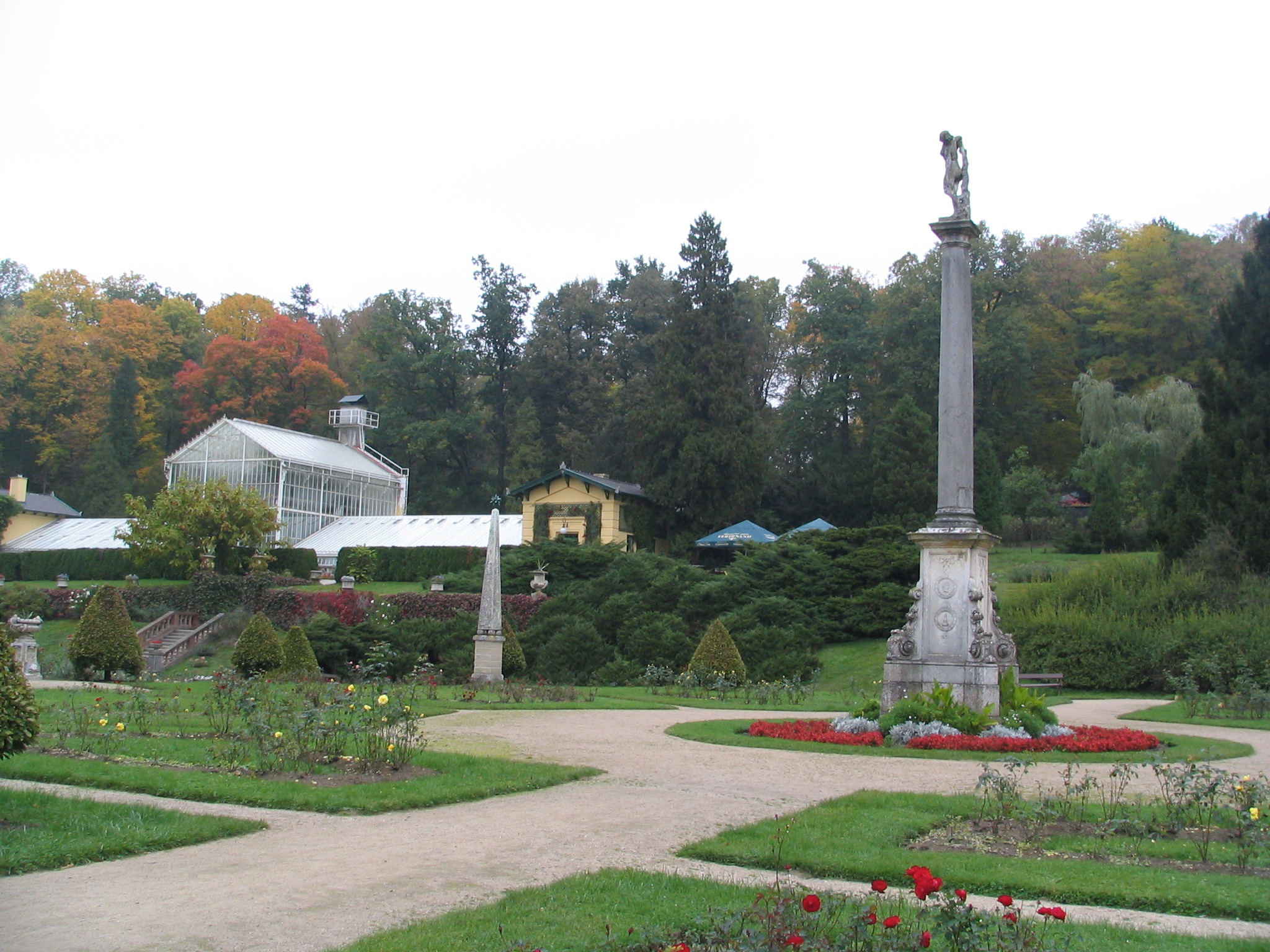 Zámek Konopiště Benešov, Benešov 1